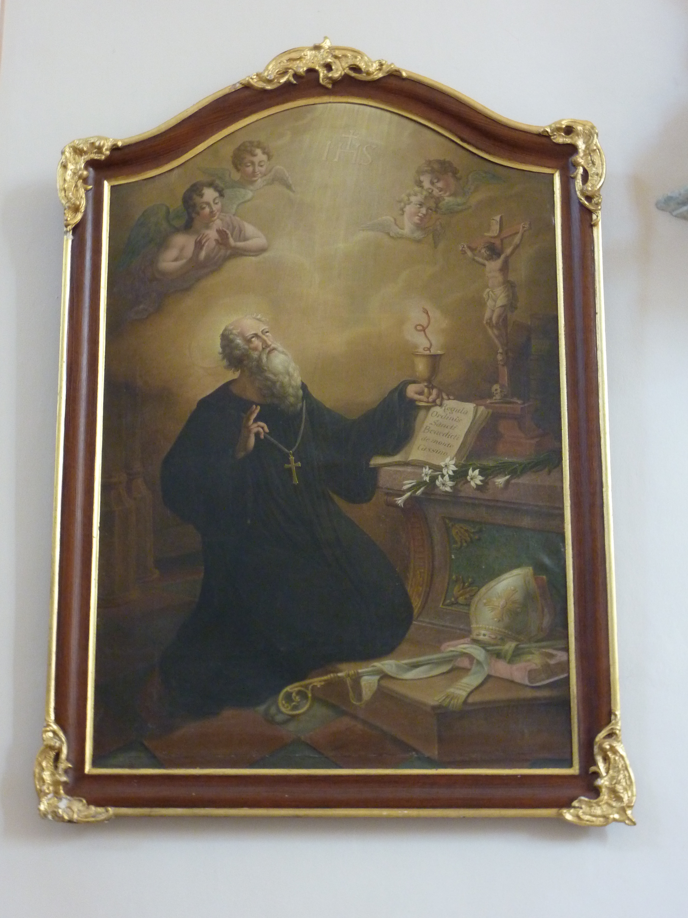 Pfarrkirche hl. Laurentius, Unternalb, Niederösterreich - Gemälde hl. Benedikt an der Südwand des Presbyteriums, Johann Höfel 1859/61